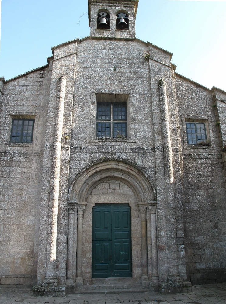 Colexiata de Sar, Sar, Santiago de Compostela, Santiago de Compostela